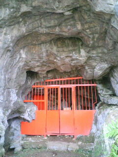 奈良県吉野郡天川村洞川の五代松鍾乳洞